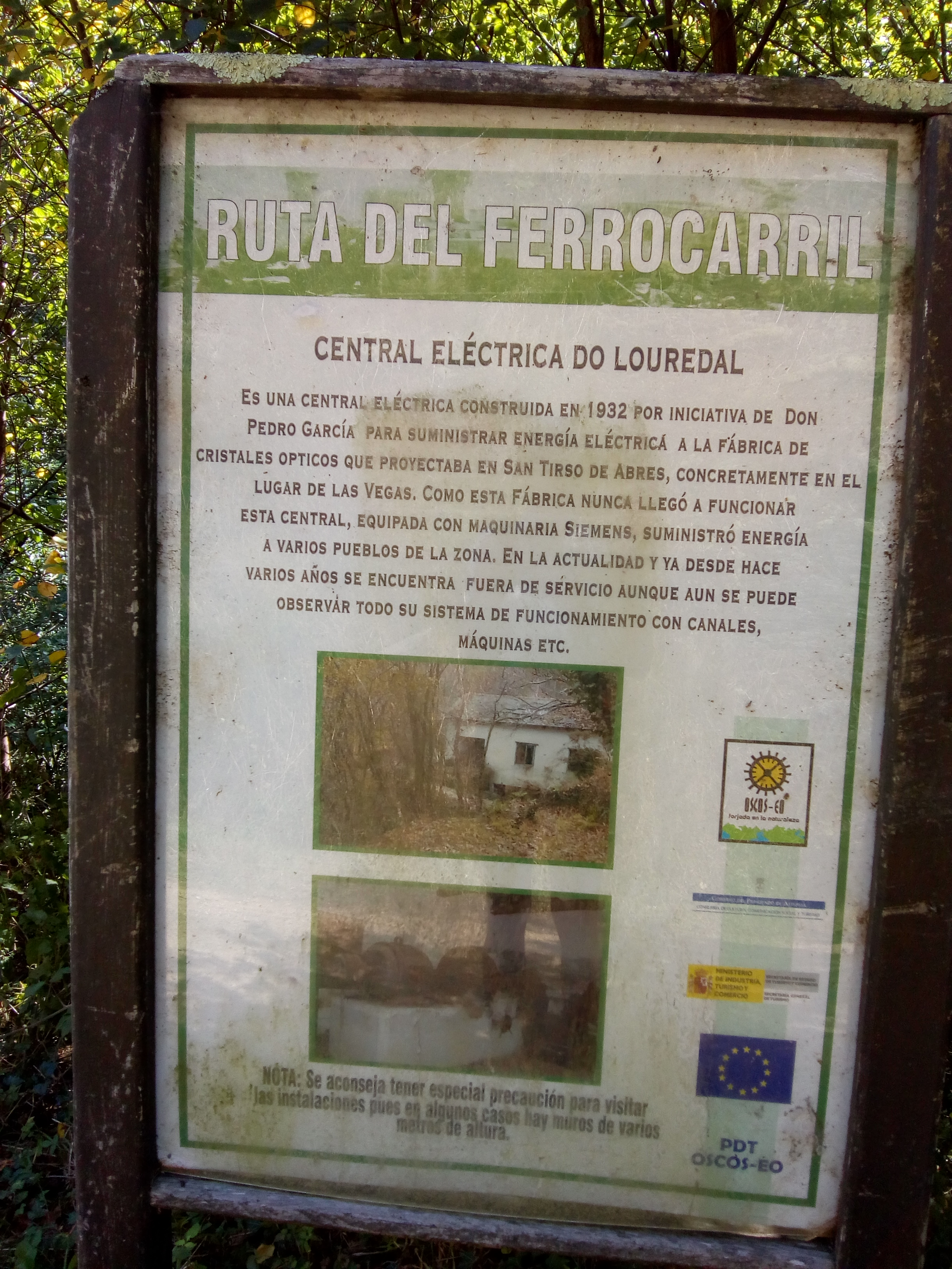 Ruta do ferrocarril. Cartel da central eléctrica do Louredal sobre o río Eo